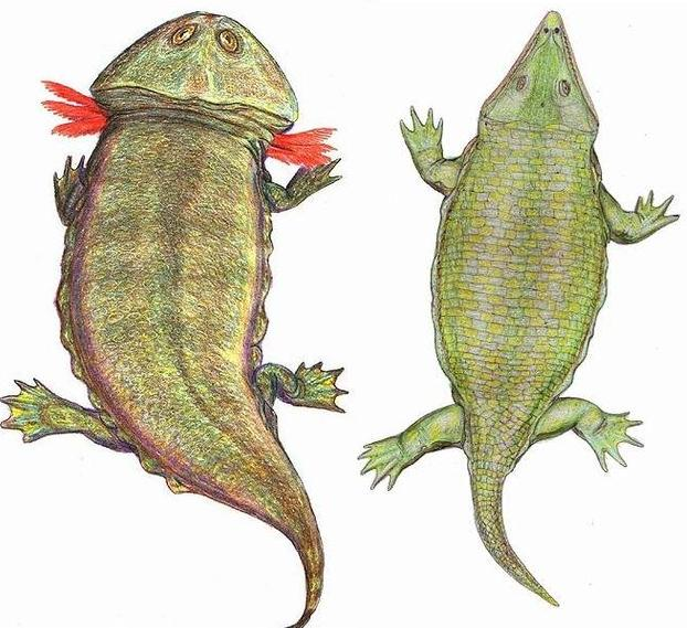 Trabajo derivado de Archivo:Plagiosaurus DB.jpg y Archivo:Laidleria1DB.jpg